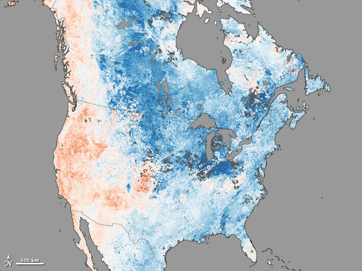 Lo que se ha denominado un vórtice polar, que produce unas temperaturas mucho más frías de lo normal en la parte continental de América del Norte, compensado en parte por unas temperaturas más elevadas de lo normal en el oeste de los Estados Unidos y Canadá.